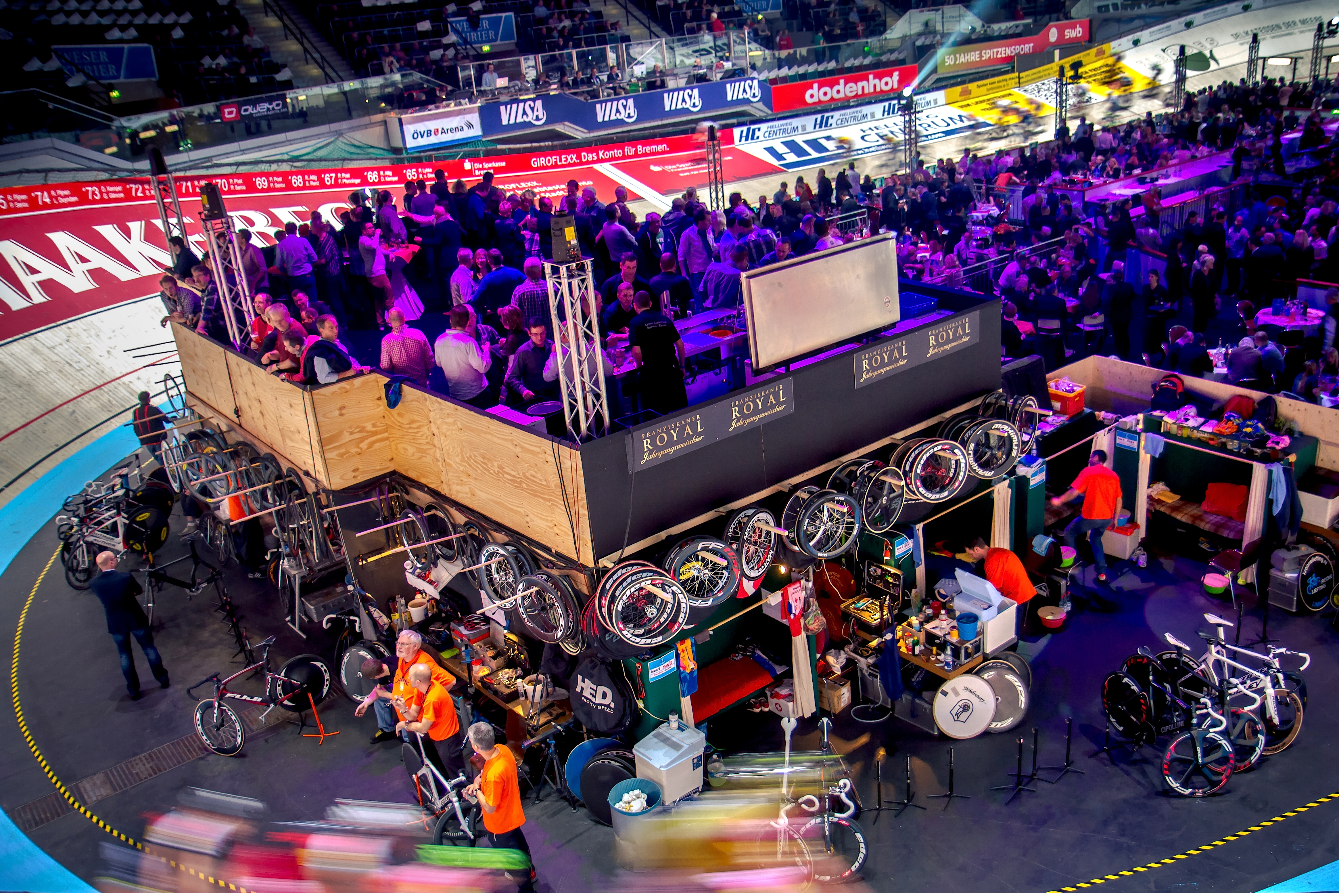 Bremer Sechstagerennen 2014 in der Bremer Stadthalle (ÖVB-Arena) in Bremen, Deutschland. Hier der Mechanikerbereich und die Fahrerkabinen im Innenraum am Ende der Bahn, unterhalb einer "VIP-Bar".